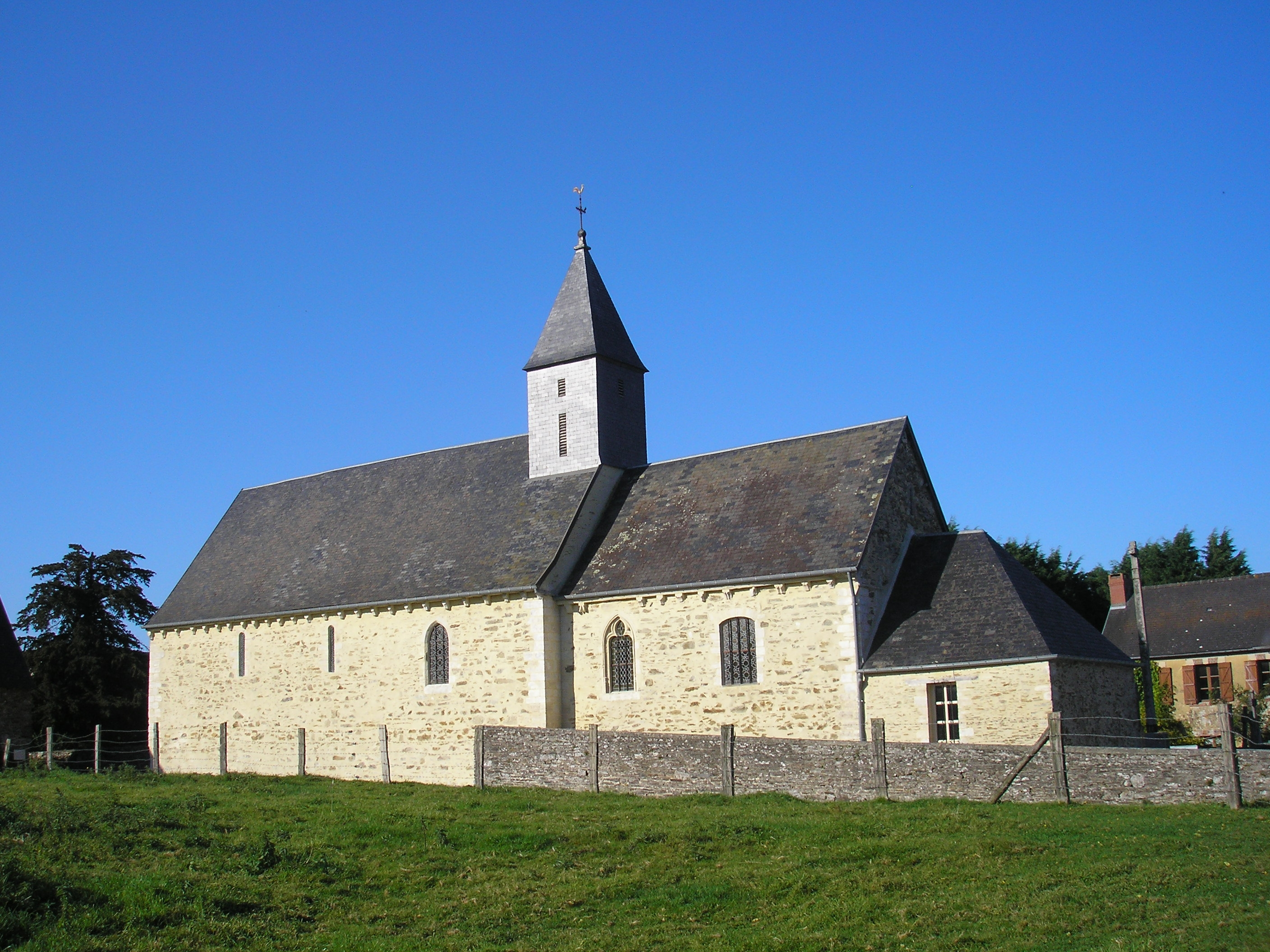 Montfiquet (Normandie, France). L'église Saint-Thomas-de-Cantorbéry.